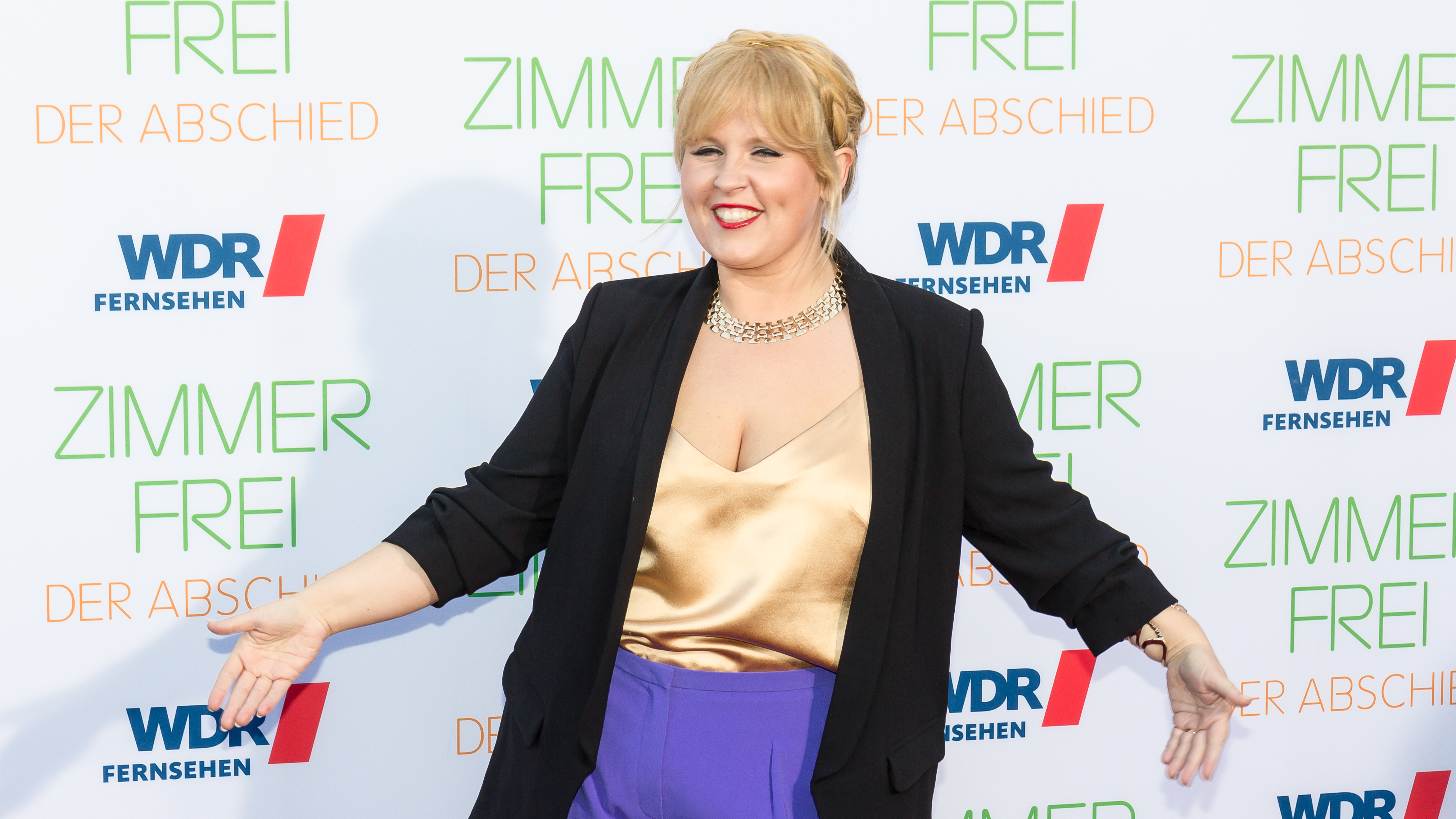 Zimmer frei - der Abschied Foto: Maite Kelly